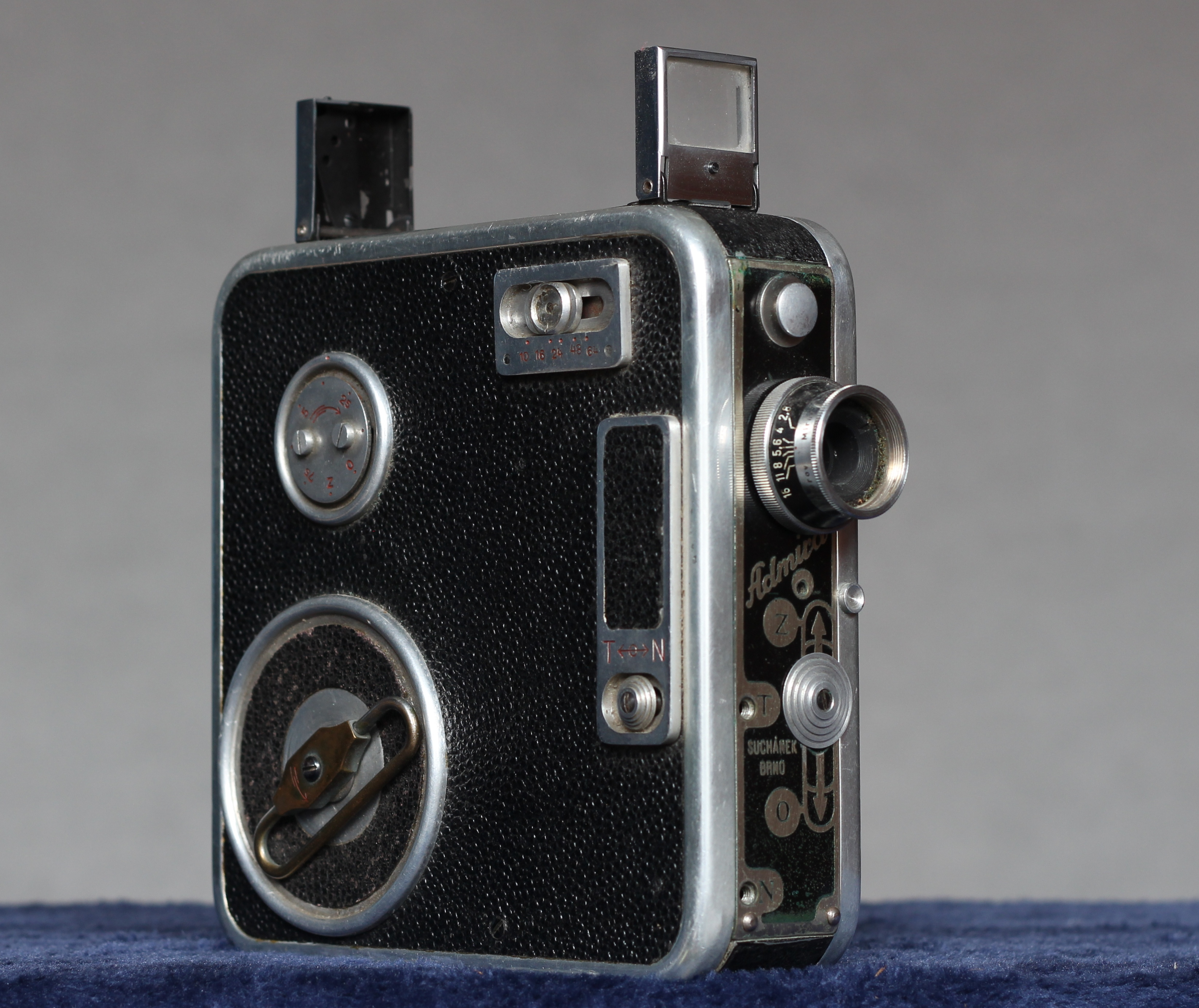 Admira 8C, výroba: Jindřich Suchánek Brno, předoboční pohled